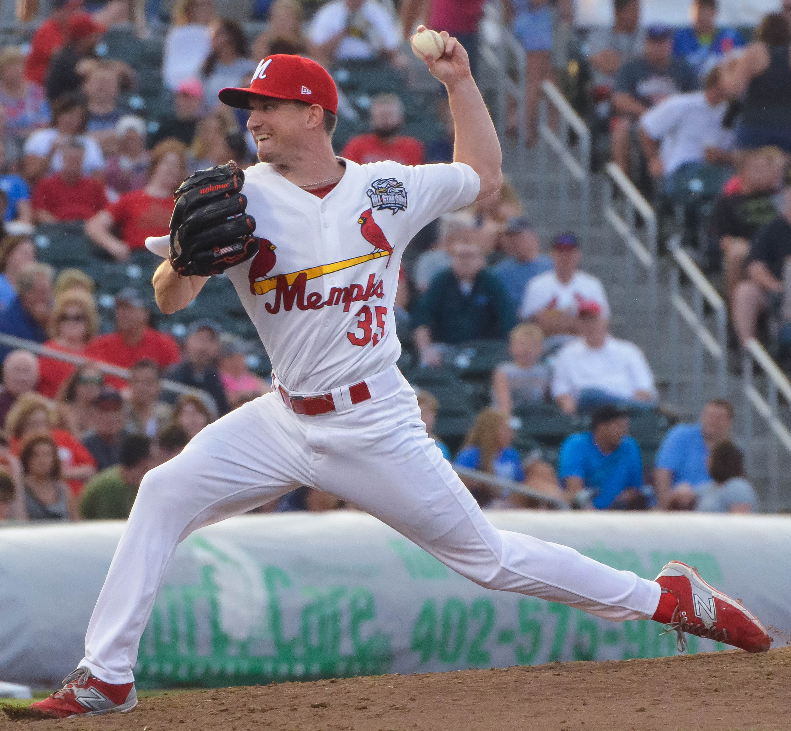 Dean Kiekhefer